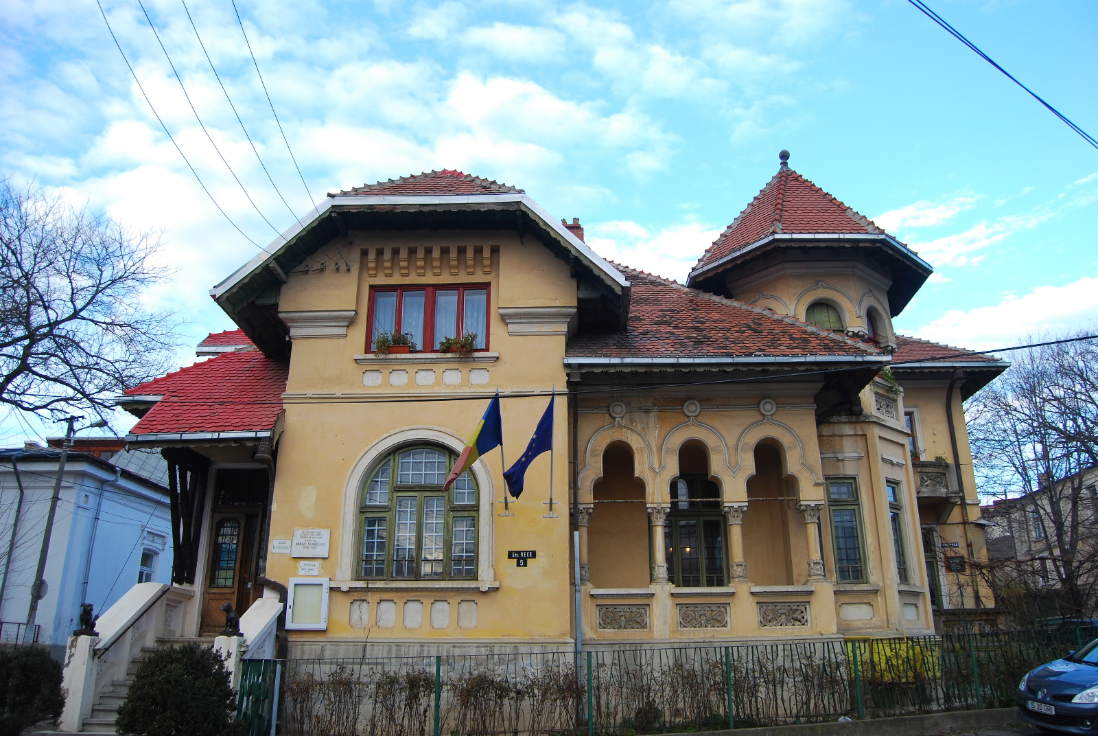 Vila "Sonet" - Casa memorială Mihail Codreanu, Muzeul Literaturii Române